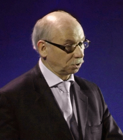 Zdjęcie zrobione podczas IV Europejskiego Kongresu Gospodarczego w Katowicach w dniach 14-16 maja 2012 r.